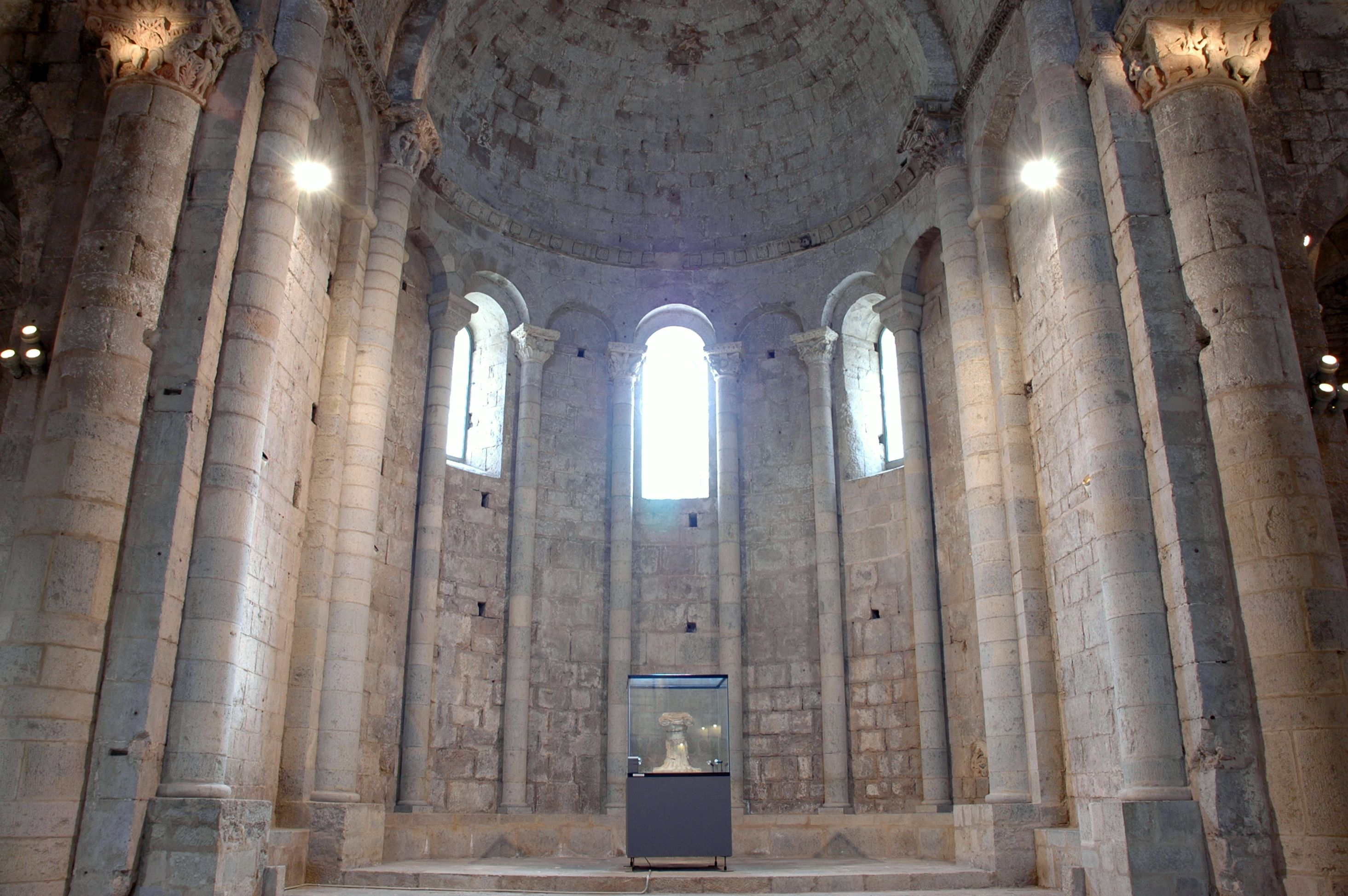 Sant Pere de Galligants - Interior